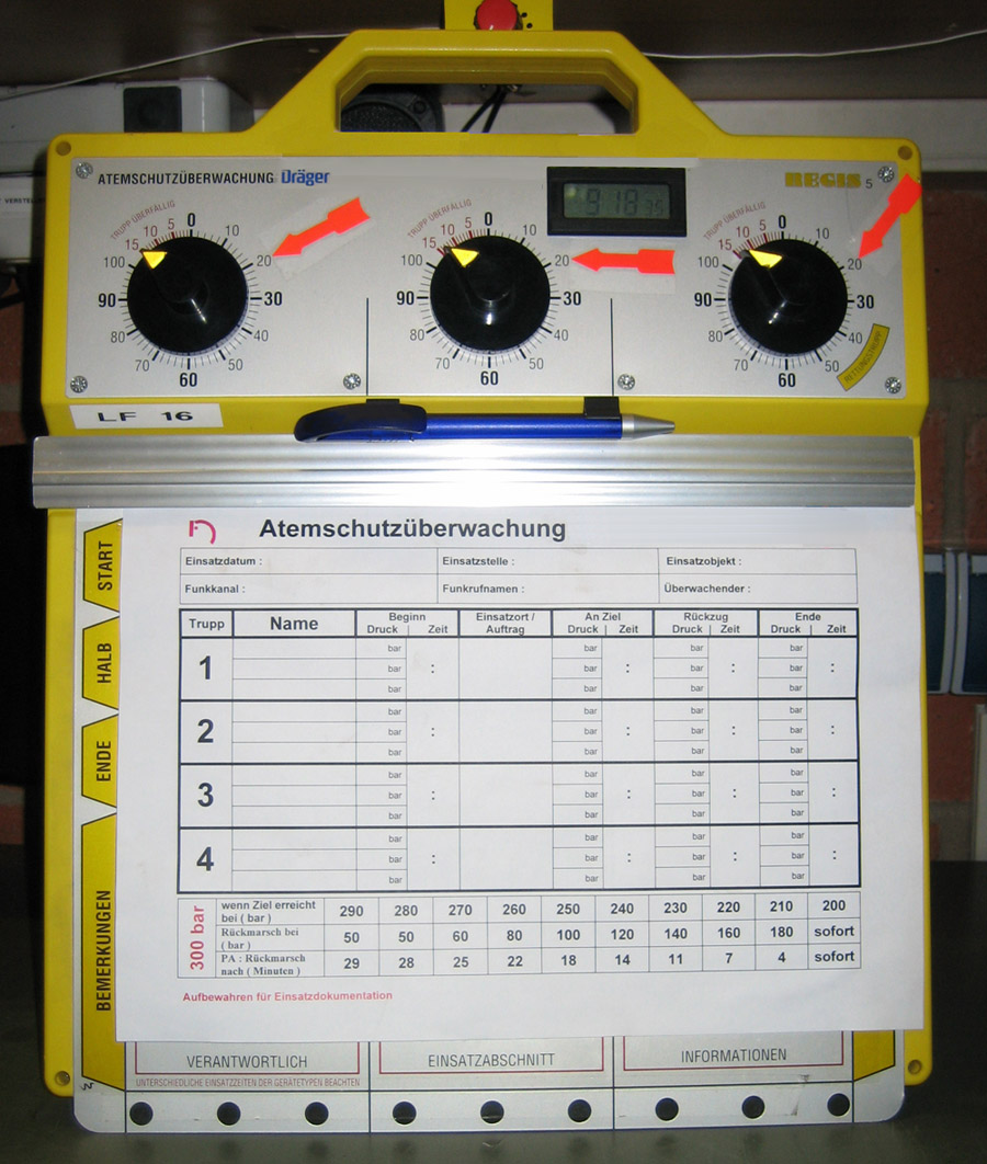 Einfache Tafel zur Atemschutzüberwachung der Firma Dräger